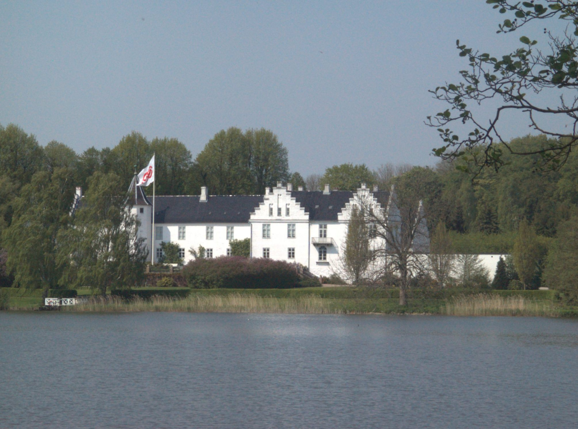 Dallund Palace (Dallund Slot) near Søndersø on Northern Funen (Nordfyn) in Denmark